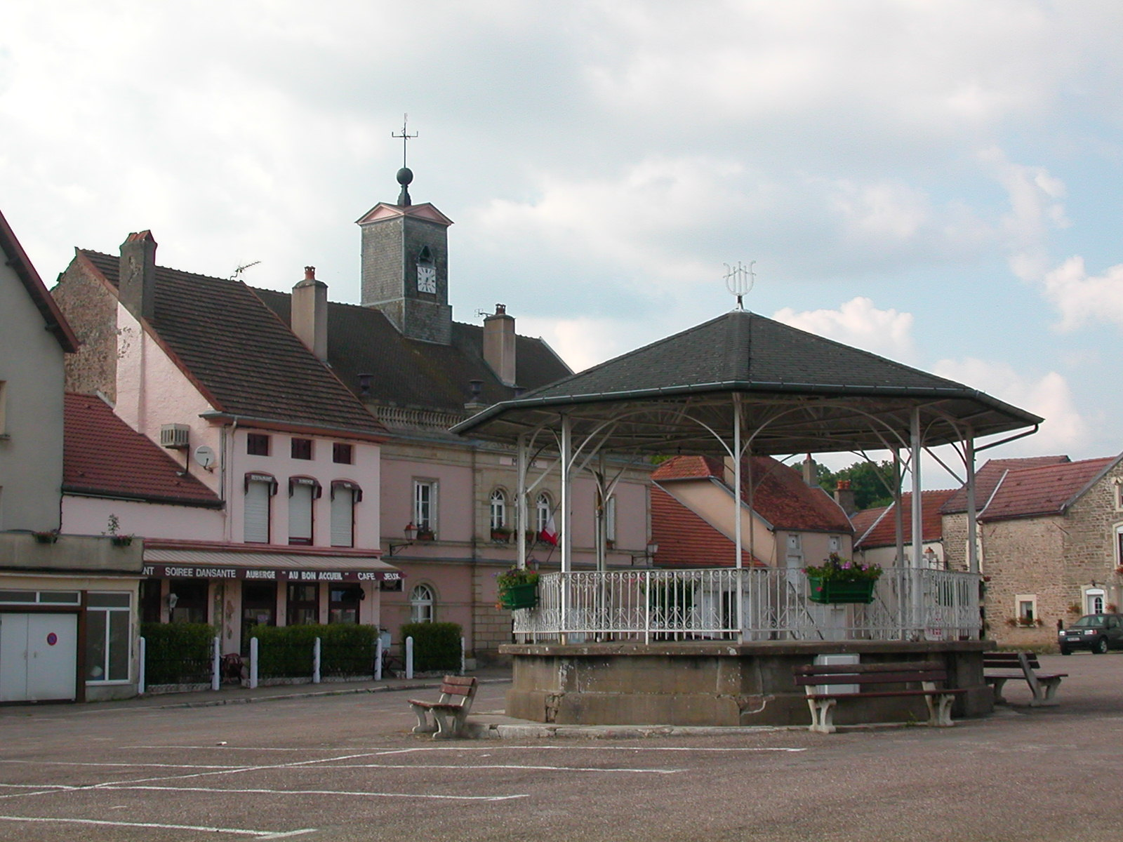 Place à FAYL BILLOT